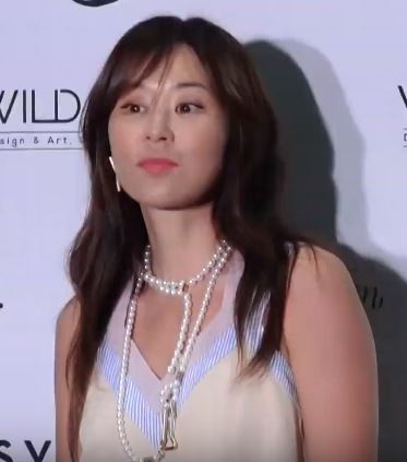 배우 최강희가 26일 오후 서울 중구 을지로 노보텔 엠베서더 동대문에서 열린 브랜드 행사에 참석했다.